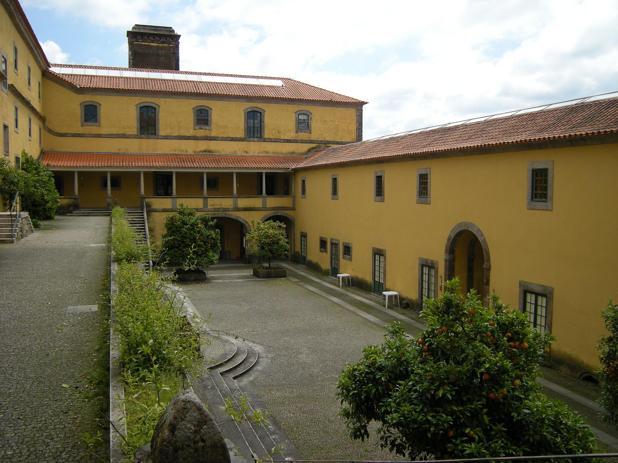 Monasterio de Santa Maria de Refóios. Localizado em Refóios do Lima, Ponte de Lima, viana do Castelo, Portugal.